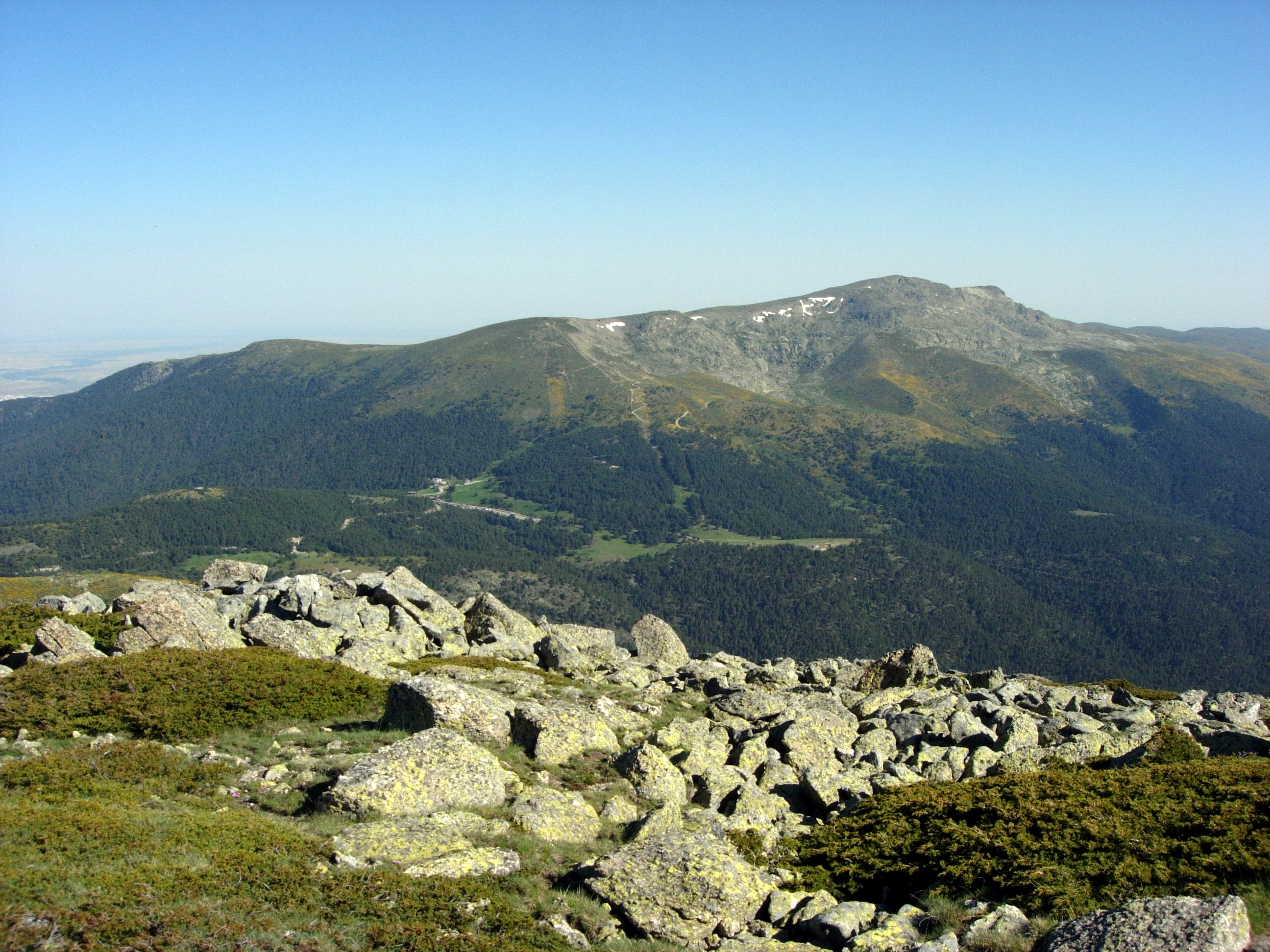 Vistas de Peñalara